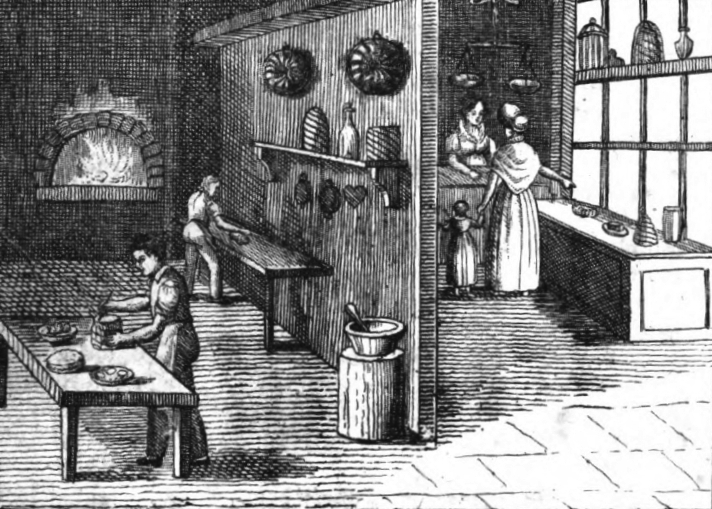 Jakob Eberhard Gailer (1792–1850): Neuer Orbis Pictus für die Jugend. Reutlingen 1832, S. 384: "Cupediarius e saccharo, aut e farina cim saccharo opus facit dulciarium – Der Zuckerbäcker macht aus Zucker, oder aus Mehl mit Zucker Confekt."